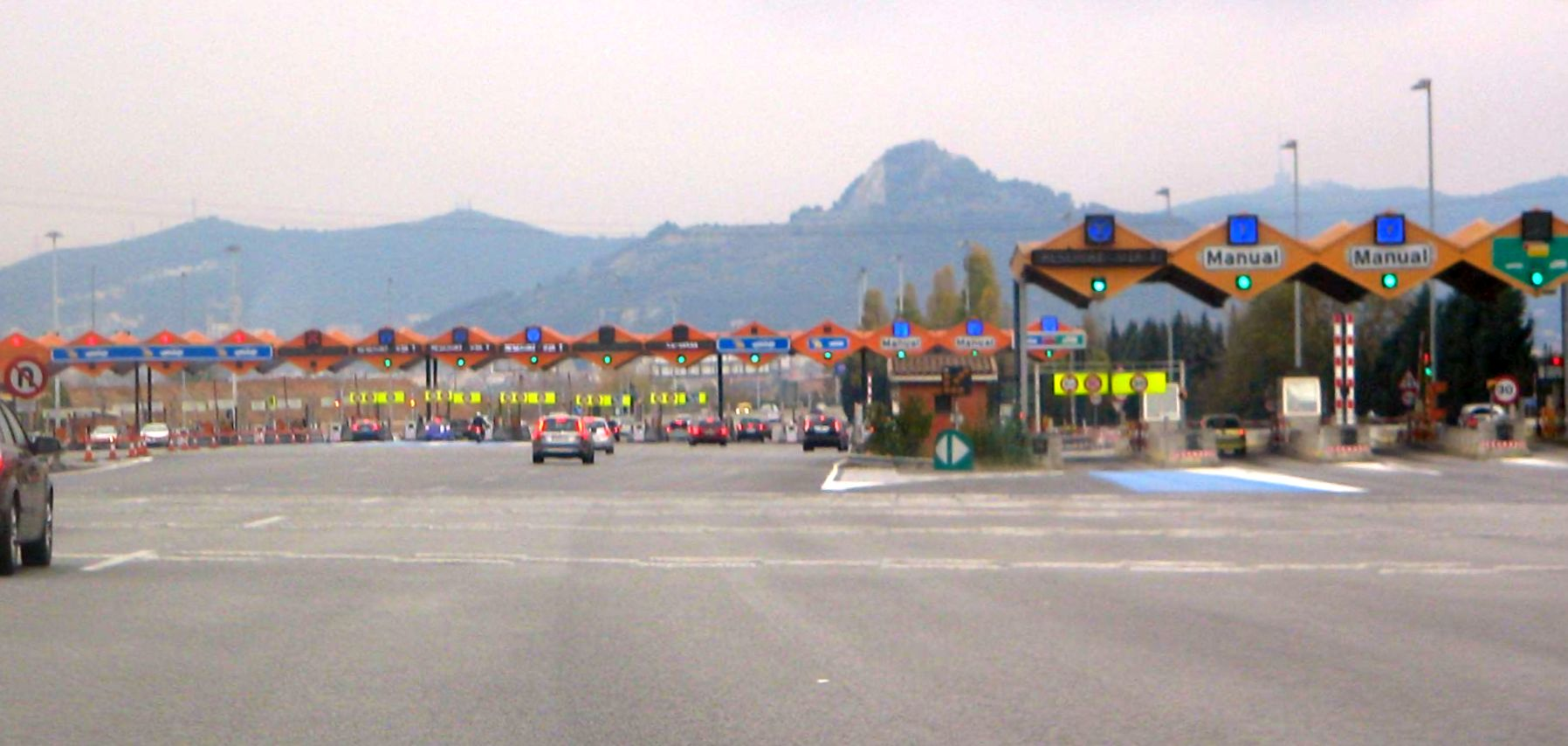 Peaje C-58